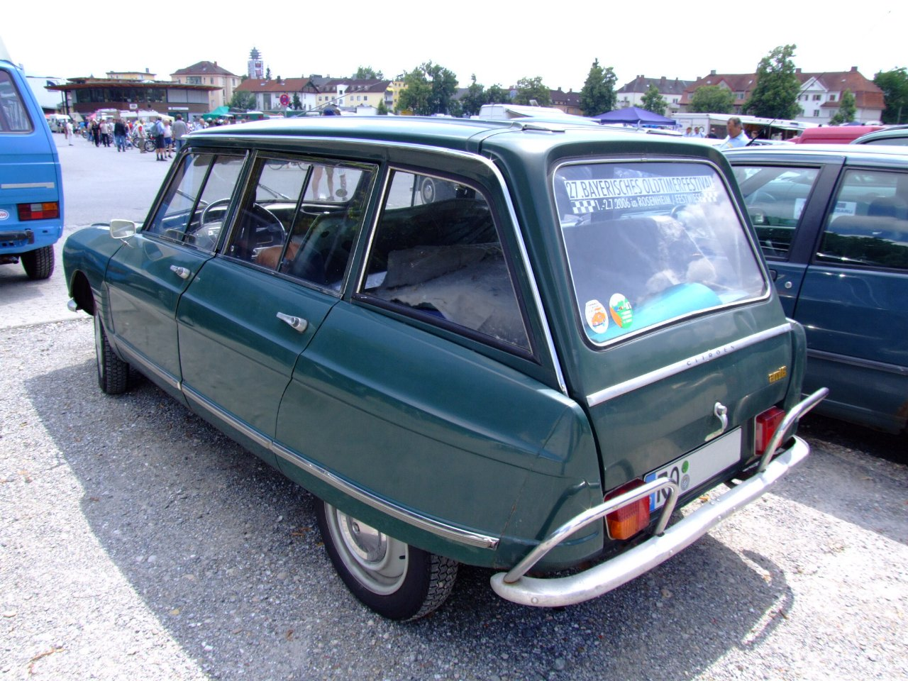 Citroen Ami6 Break